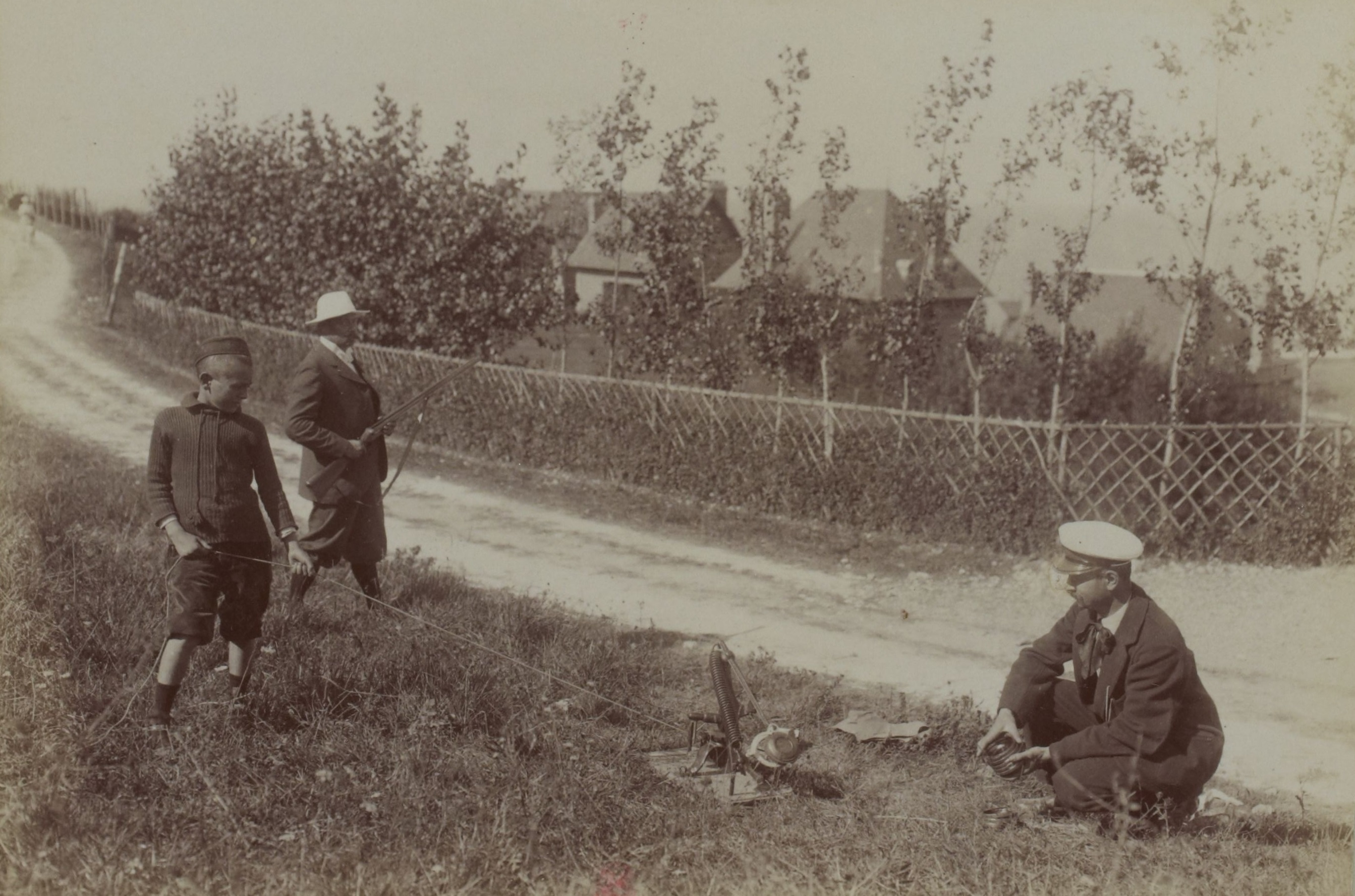 [Collection Jules Beau. Photographie sportive] : T. 10. Année 1899 / Jules Beau : F. 21. [Course Paris - Ostende, 1 septembre 1899] ; Balltrap